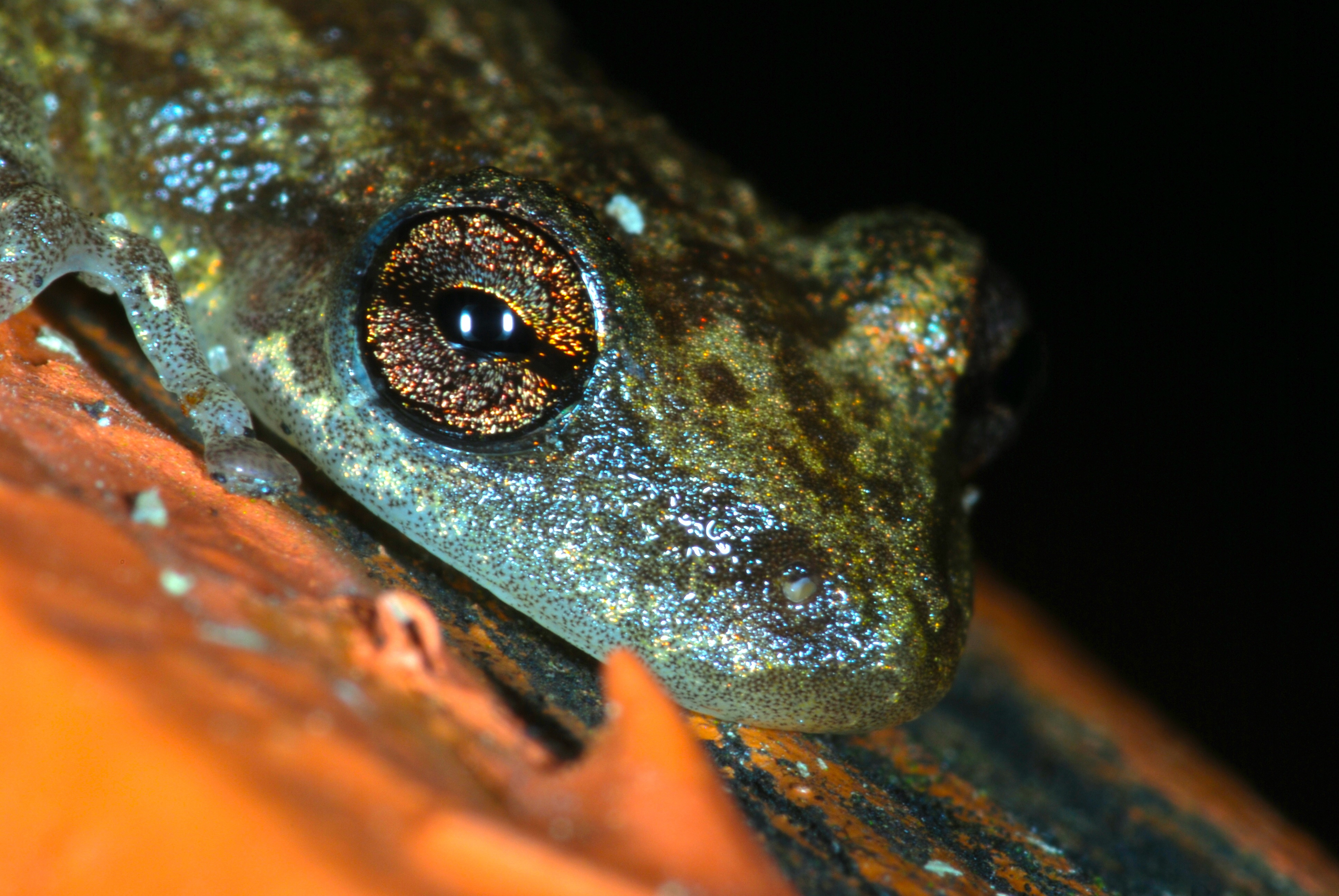 Orange Walk, BELIZE